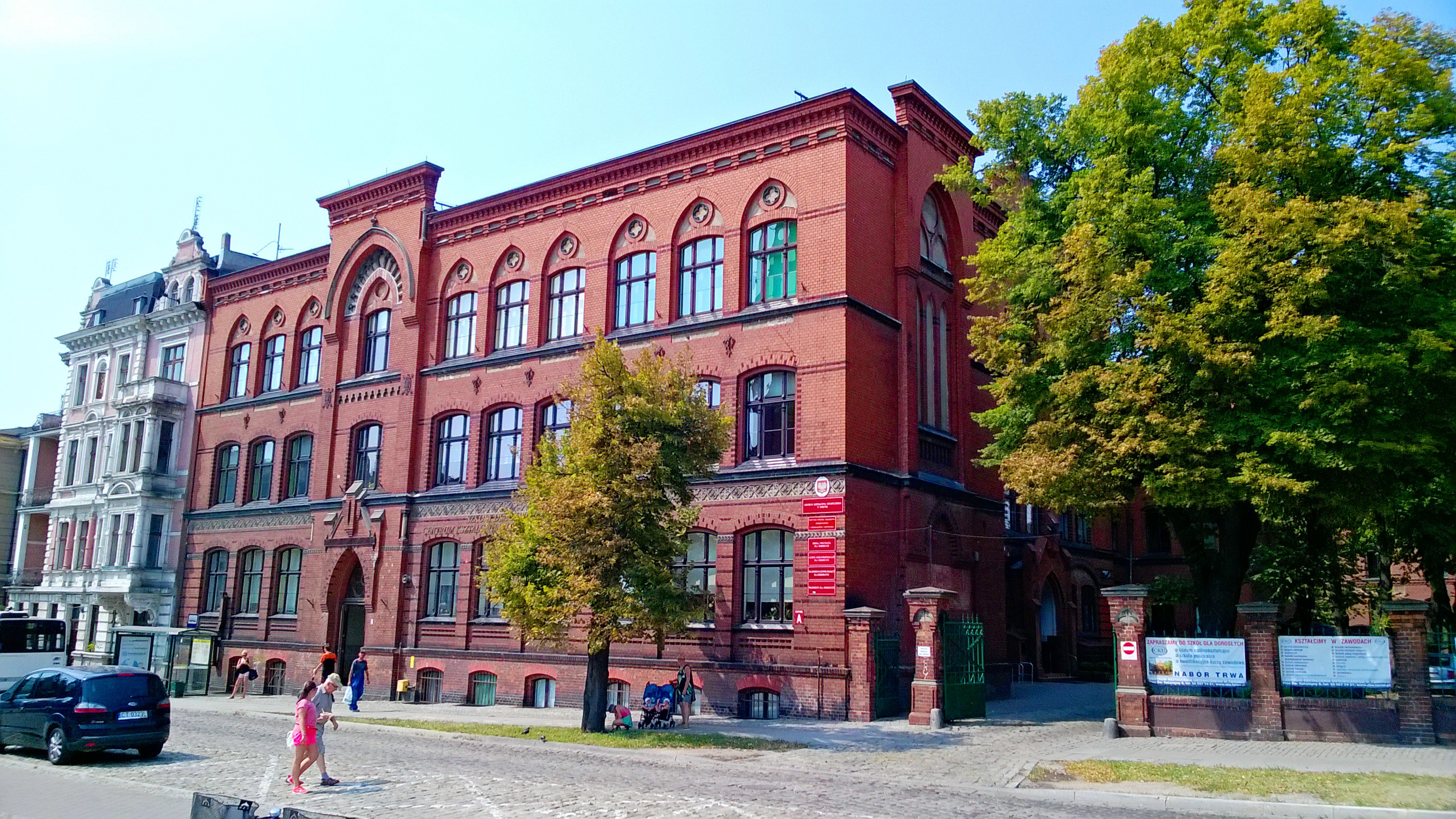 Plac Świętej Katarzyny w Toruniu4